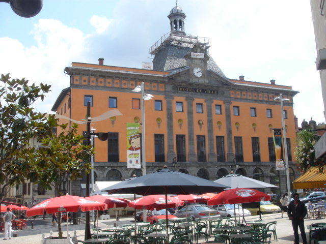 Hôtel de ville d'Aurillac.